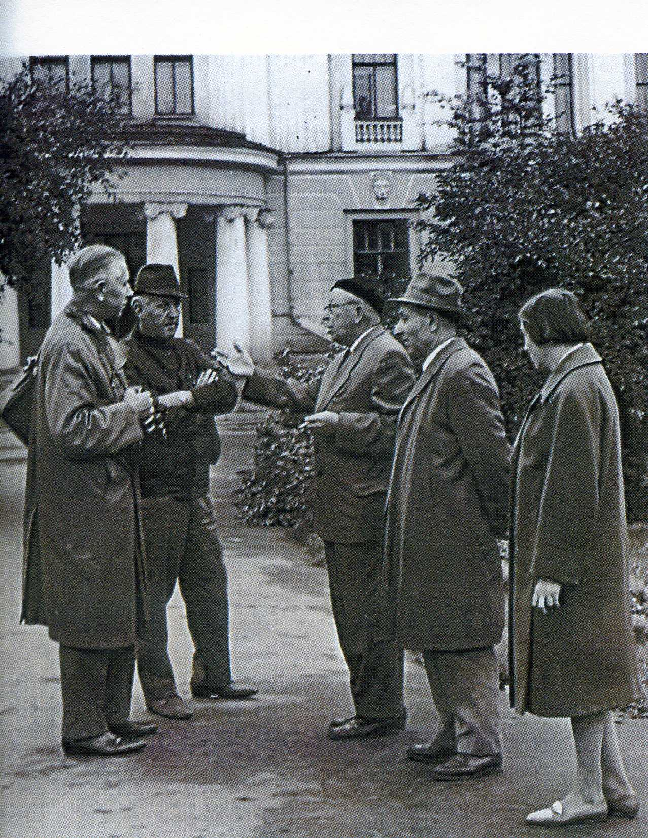 Соколов третий справа